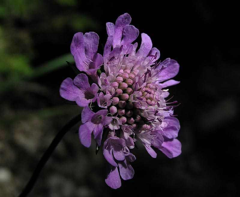 Glanz-Skabiose (Scabiosa lucida), aufgenommen in der Nähe der Grutten-Hütte (Wilder Kaiser)